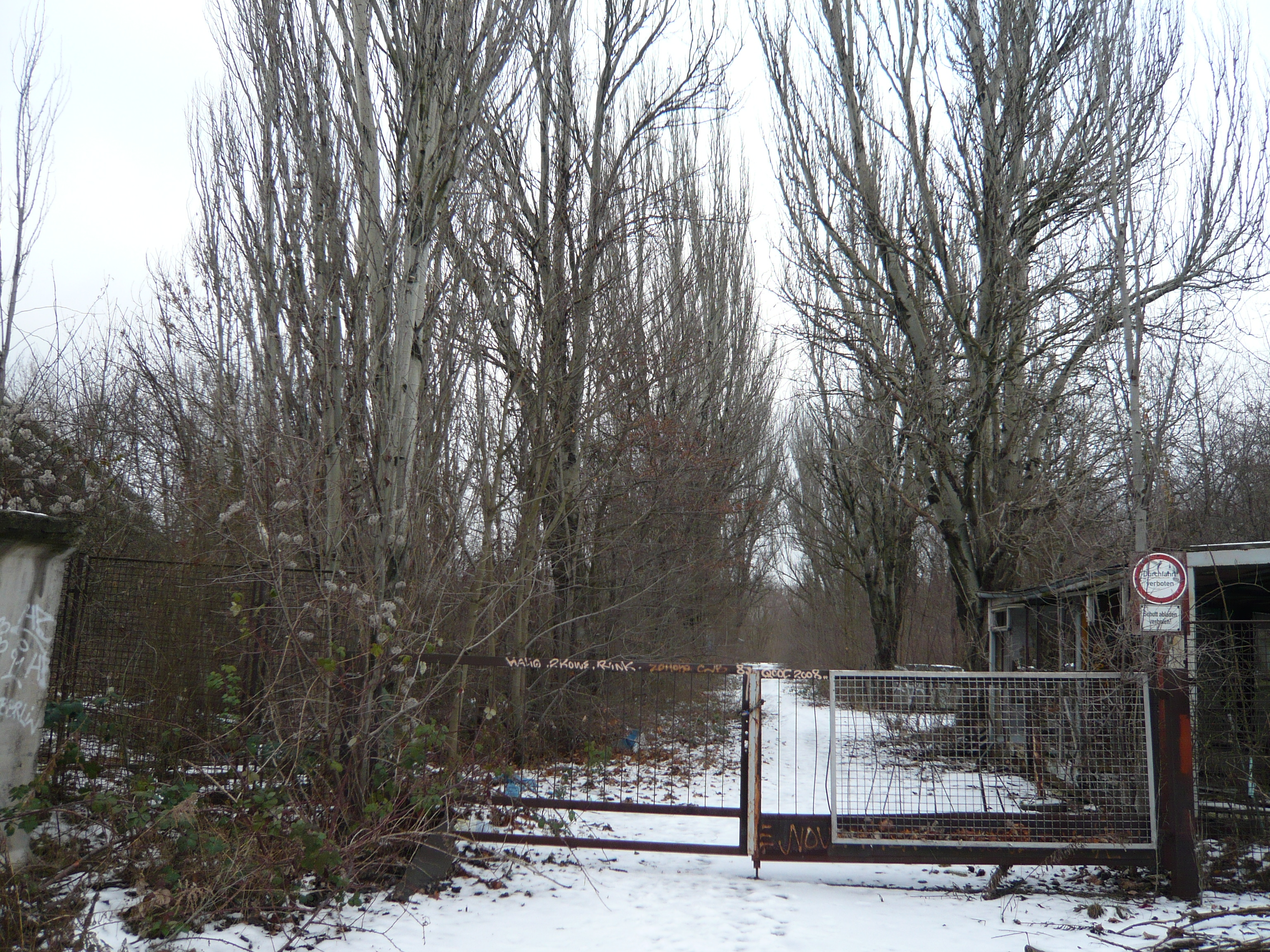 altes Lichtenberger Stadion, alter Eingang im Januar 2009 (1)